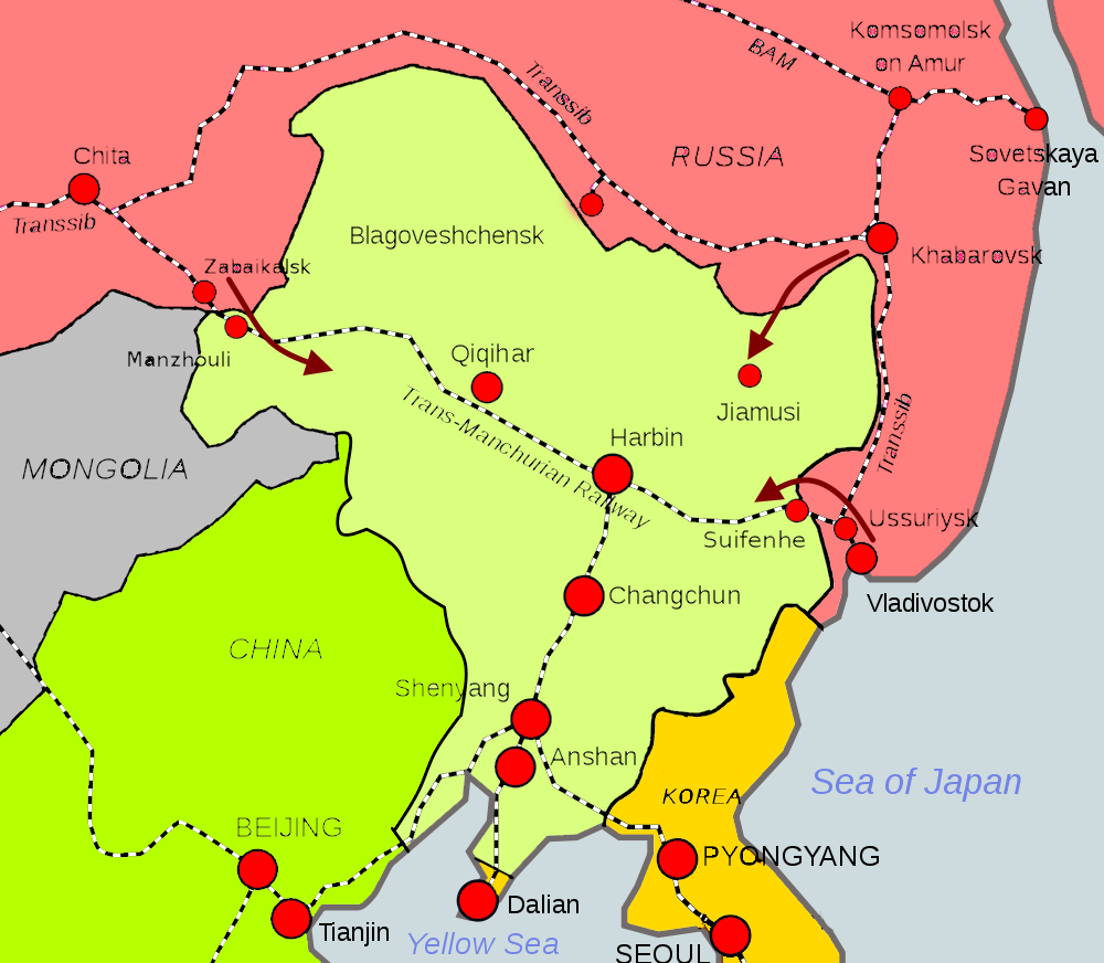 Carte du Conflit sino-soviétique (1929)